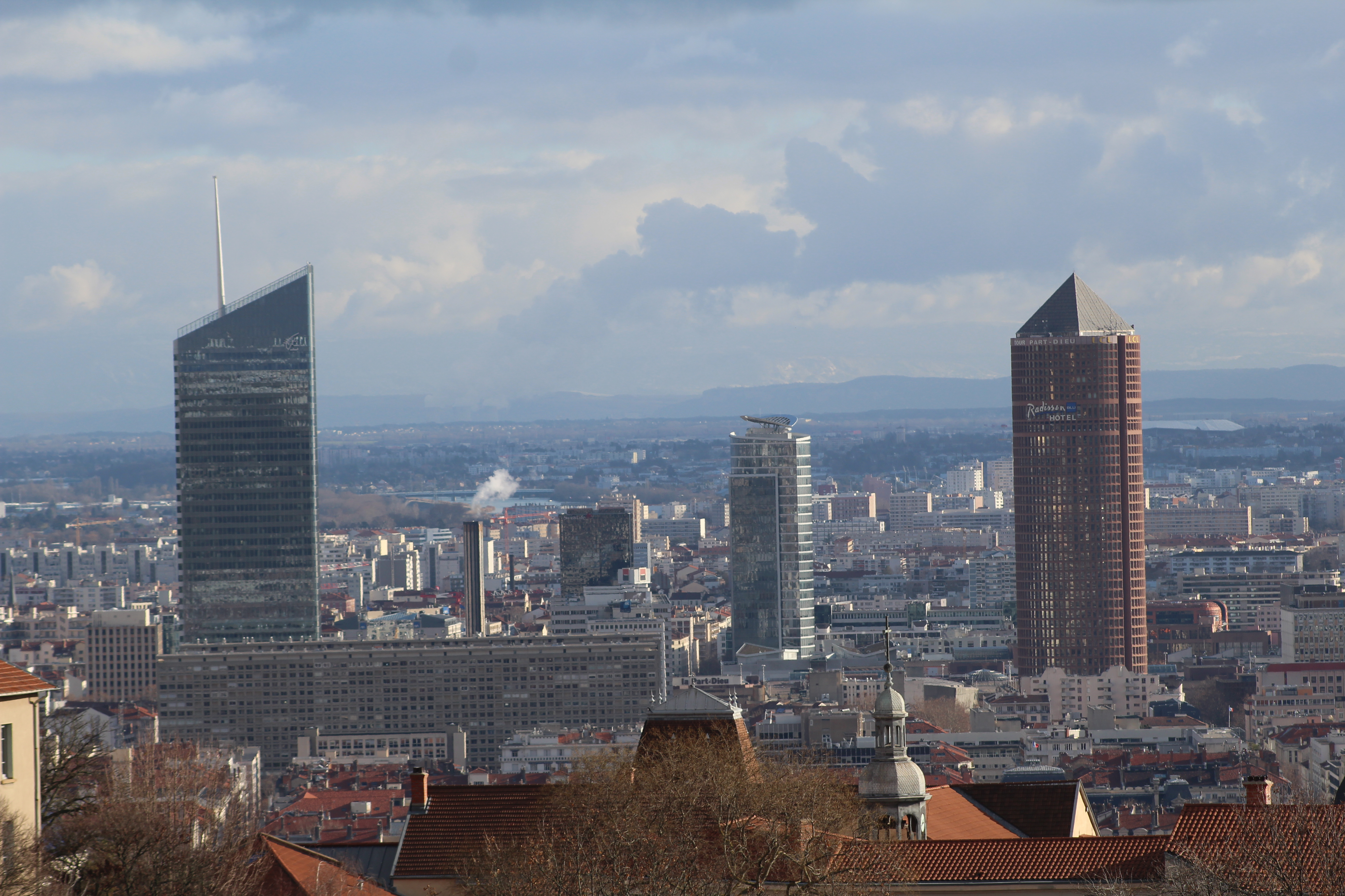 Tour Incity, Tour de la Part-Dieu et Tour Oxygène, Lyon.